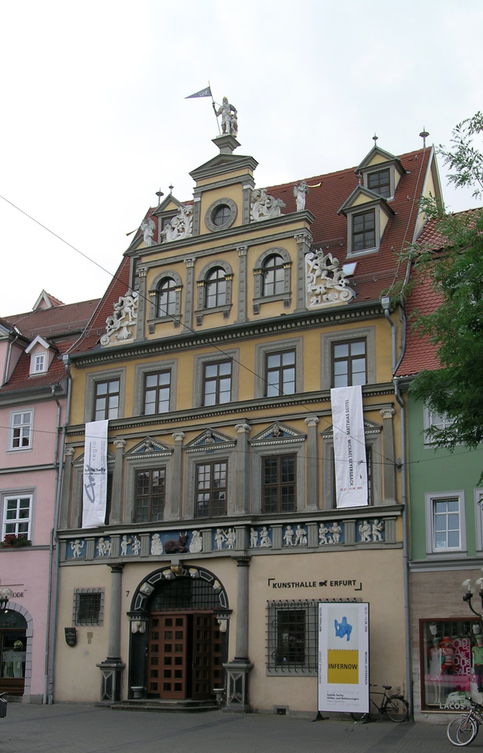 Haus Zum Roten Ochsen, Fischmarkt, Erfurt, Germany.